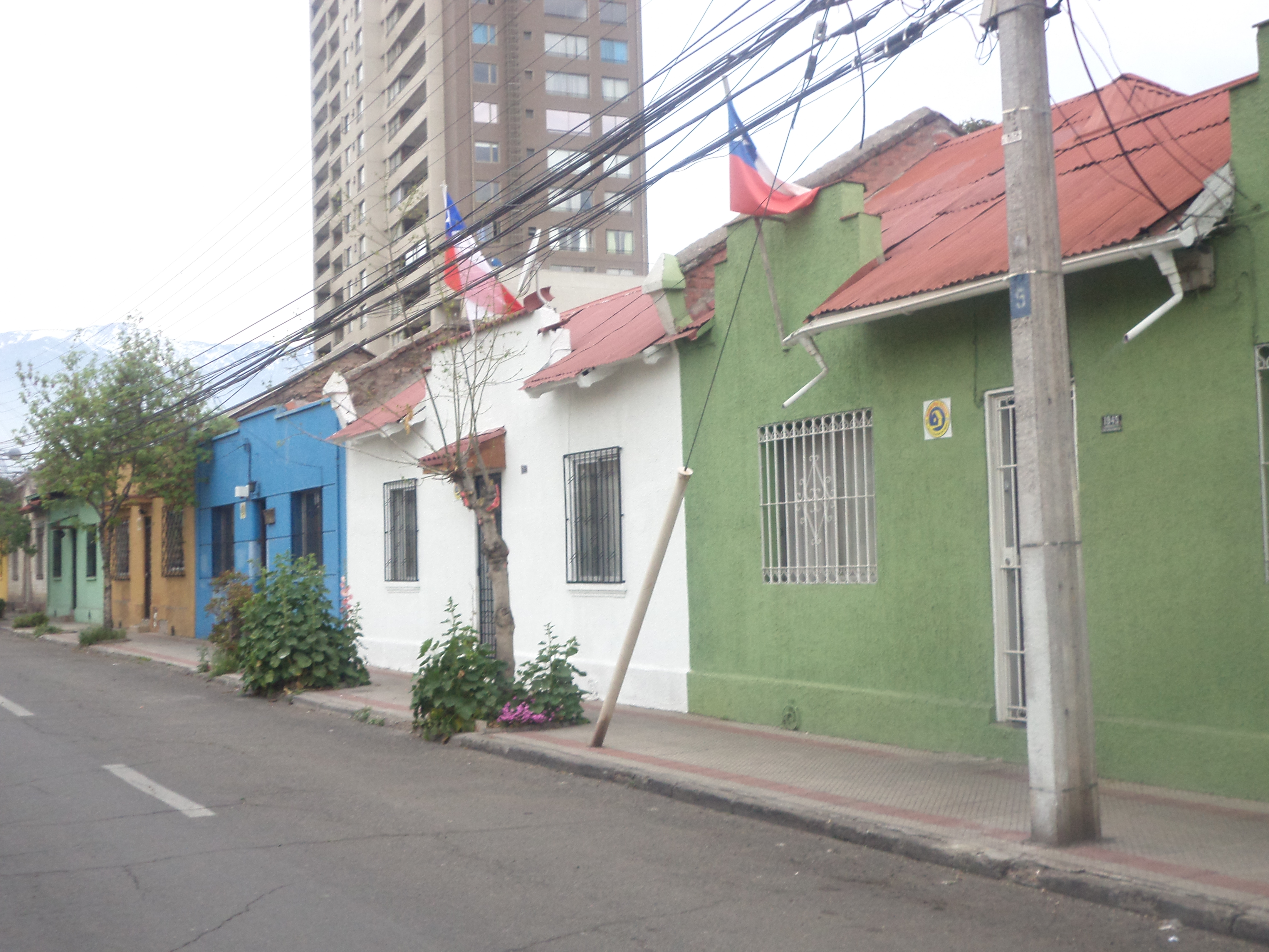 Población para Suboficiales de la Escuela de Aplicación de Caballería This is a photo of a national monument in Chile: 2092